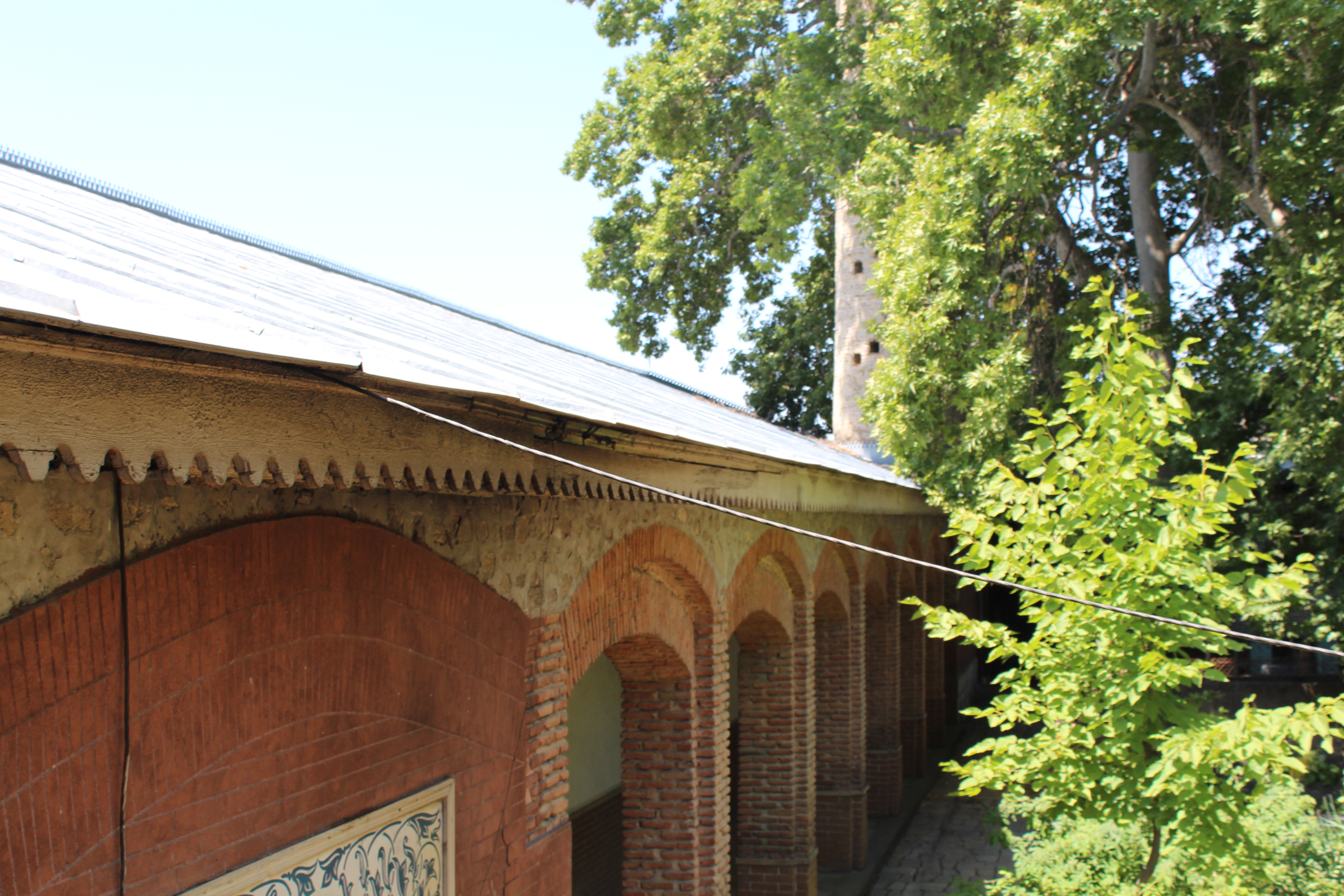 Şəki Xan məscidi